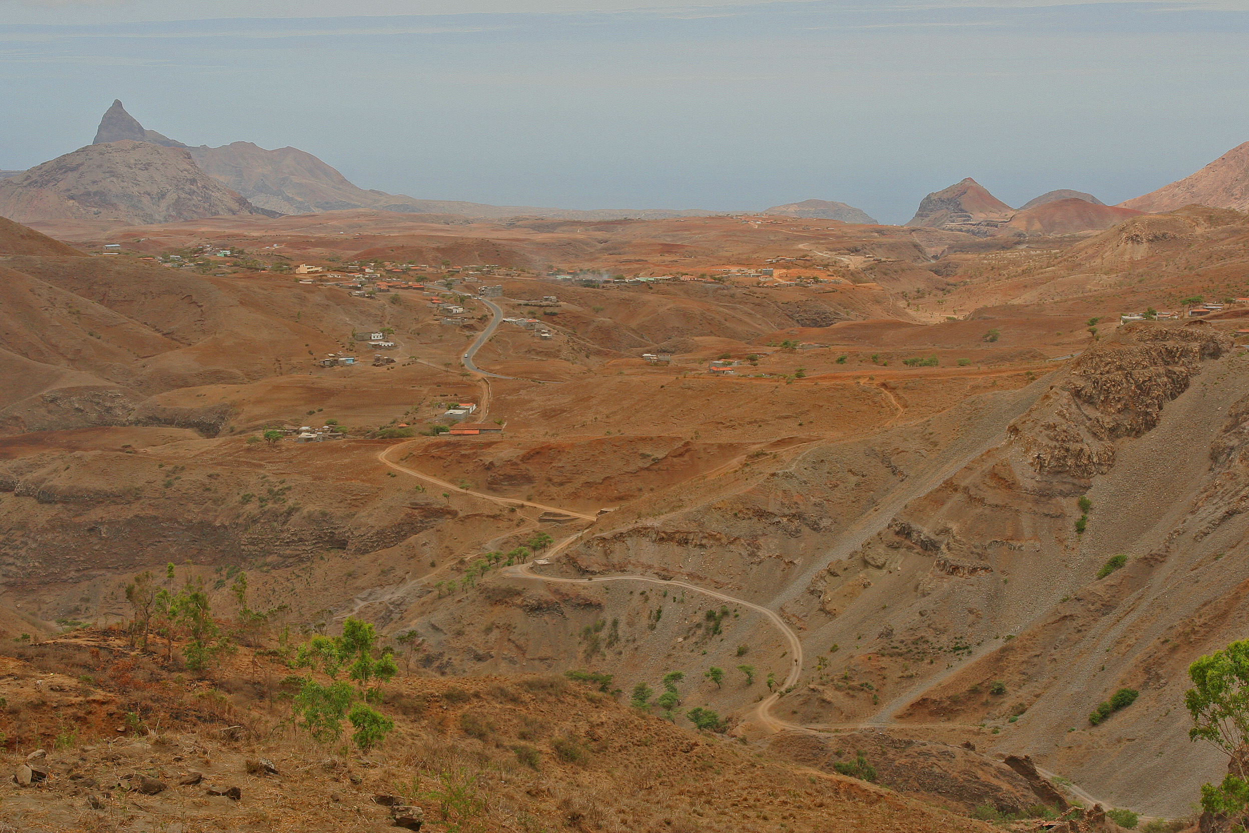 Paysage typique de la municipalité (concelho) de Santa Catarina (île de Santago, Cap-Vert)